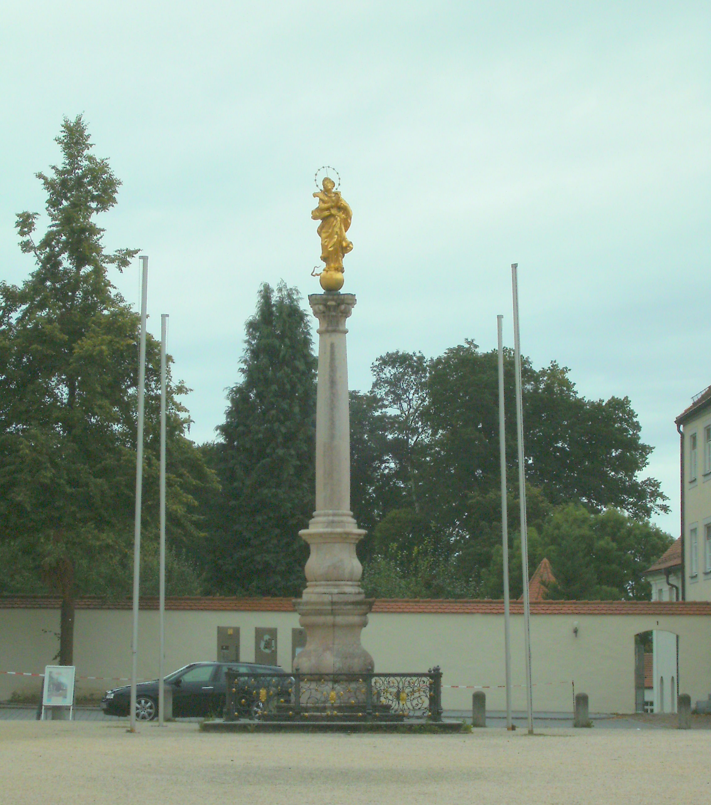 Pfarrkirche St Georg Mariensäule auf dem Vorplatz